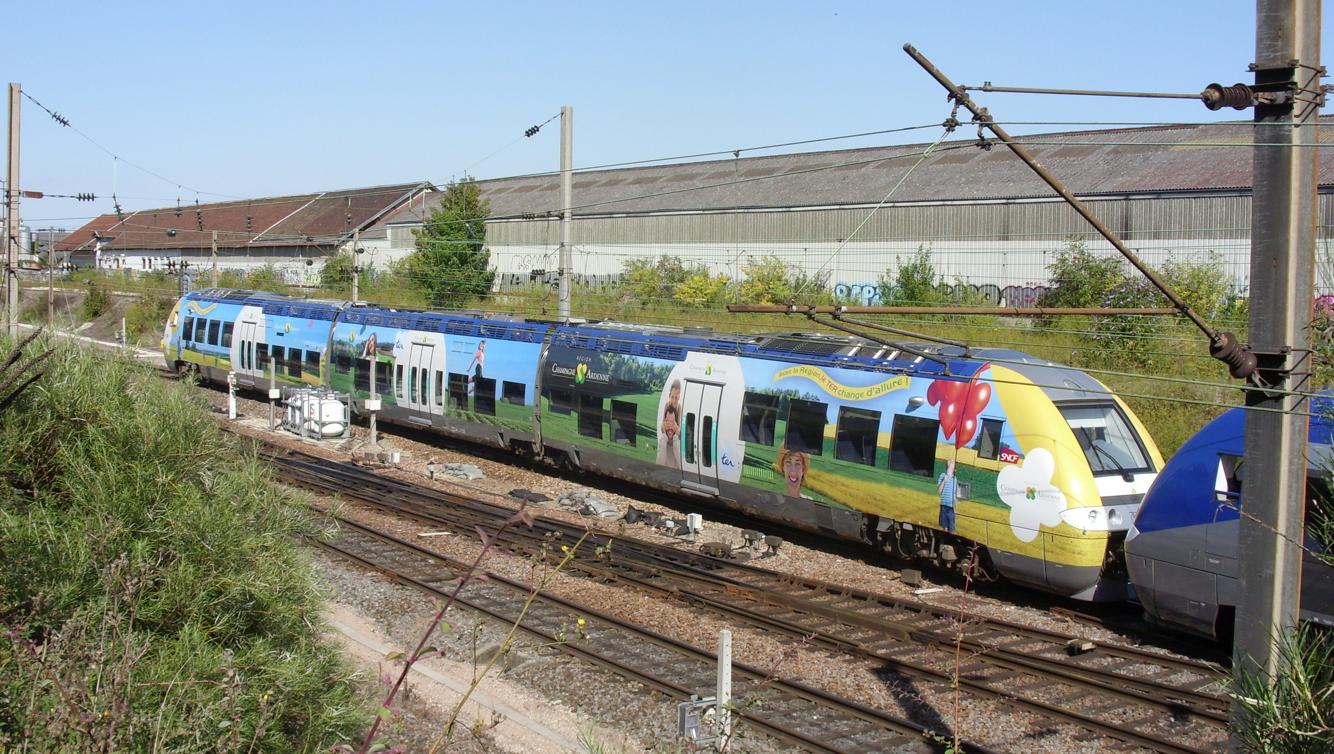 Un TER Champagne Ardenne près de la gare de Reims